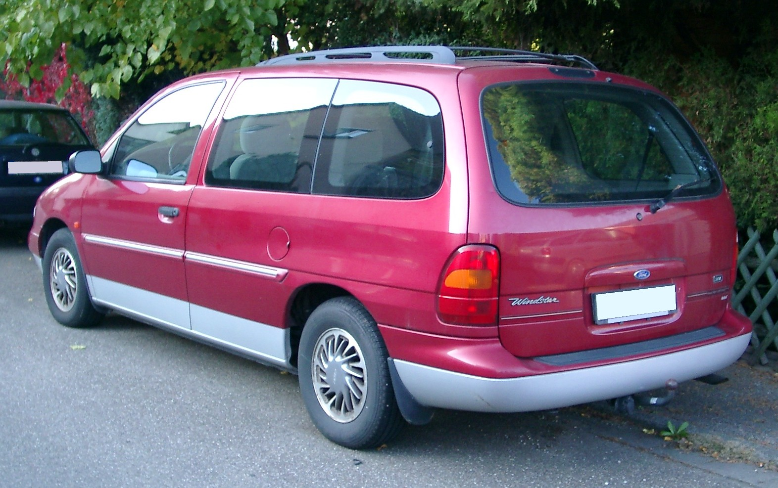 Ford Windstar, 1. Generation